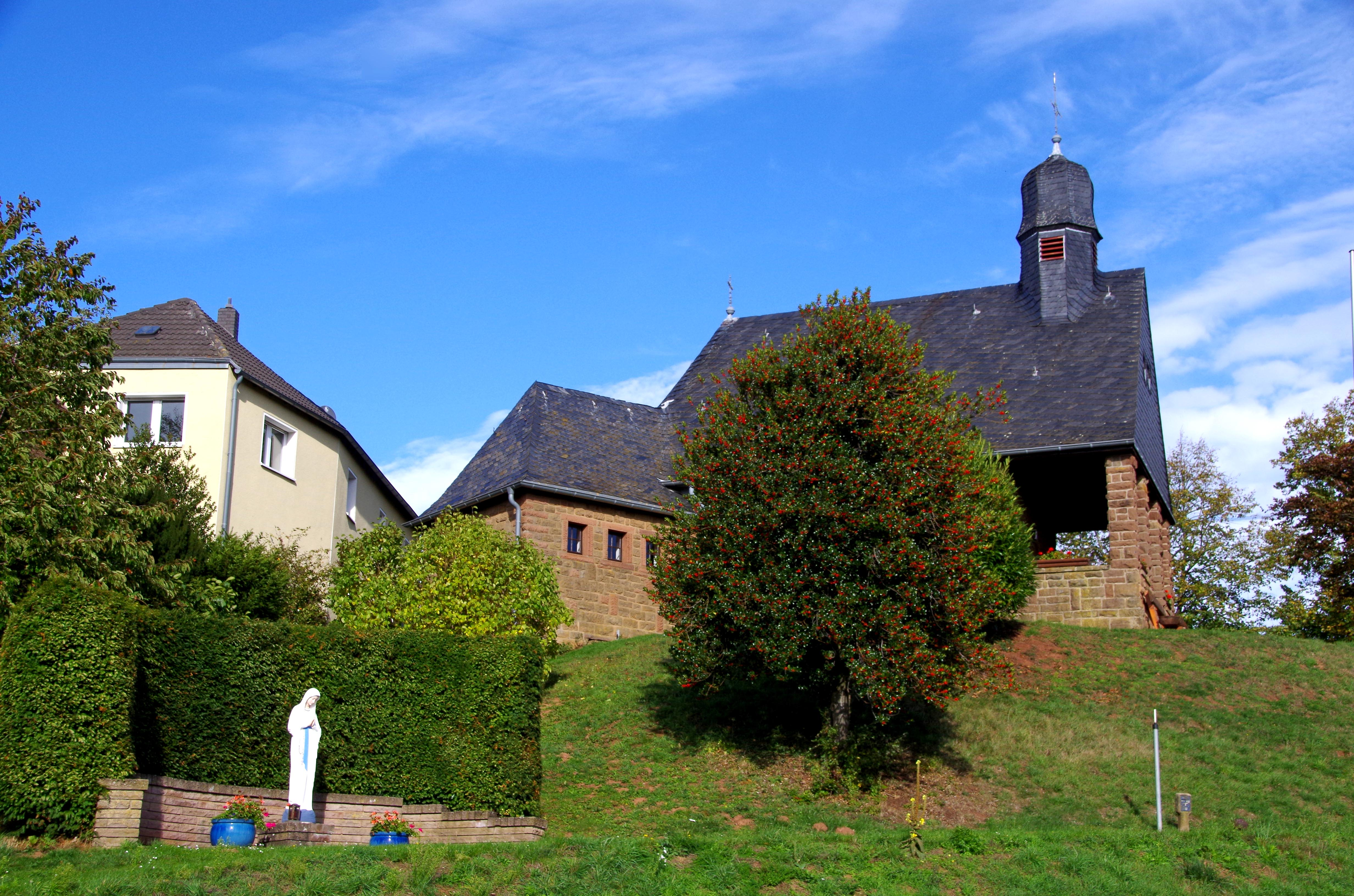 St. Barbara (Bergbuir), Südseite von unten